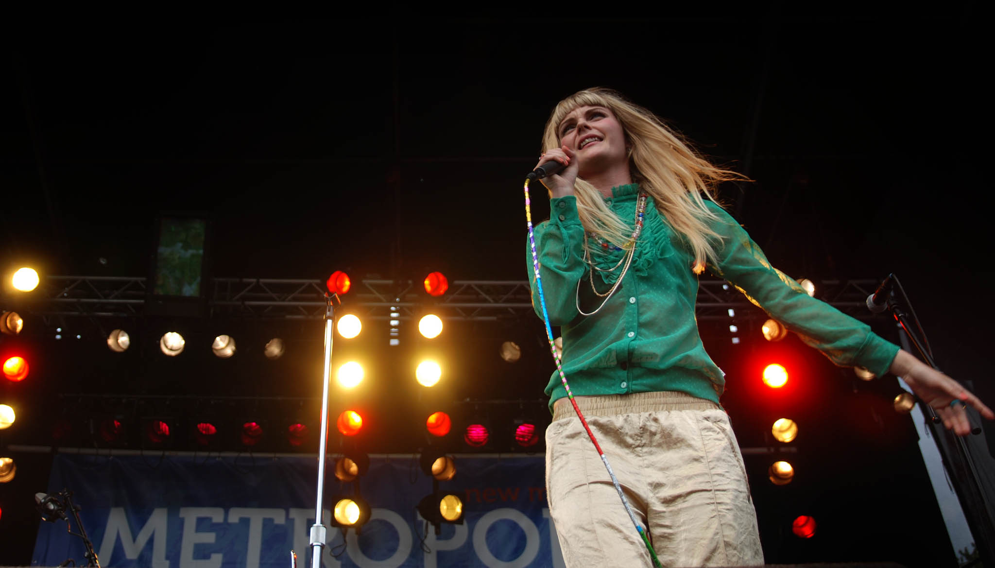 Метте Линдберг, вокалистка группы The Asteroids Galaxy Tour, на концерте в Роттердаме в 2009 году